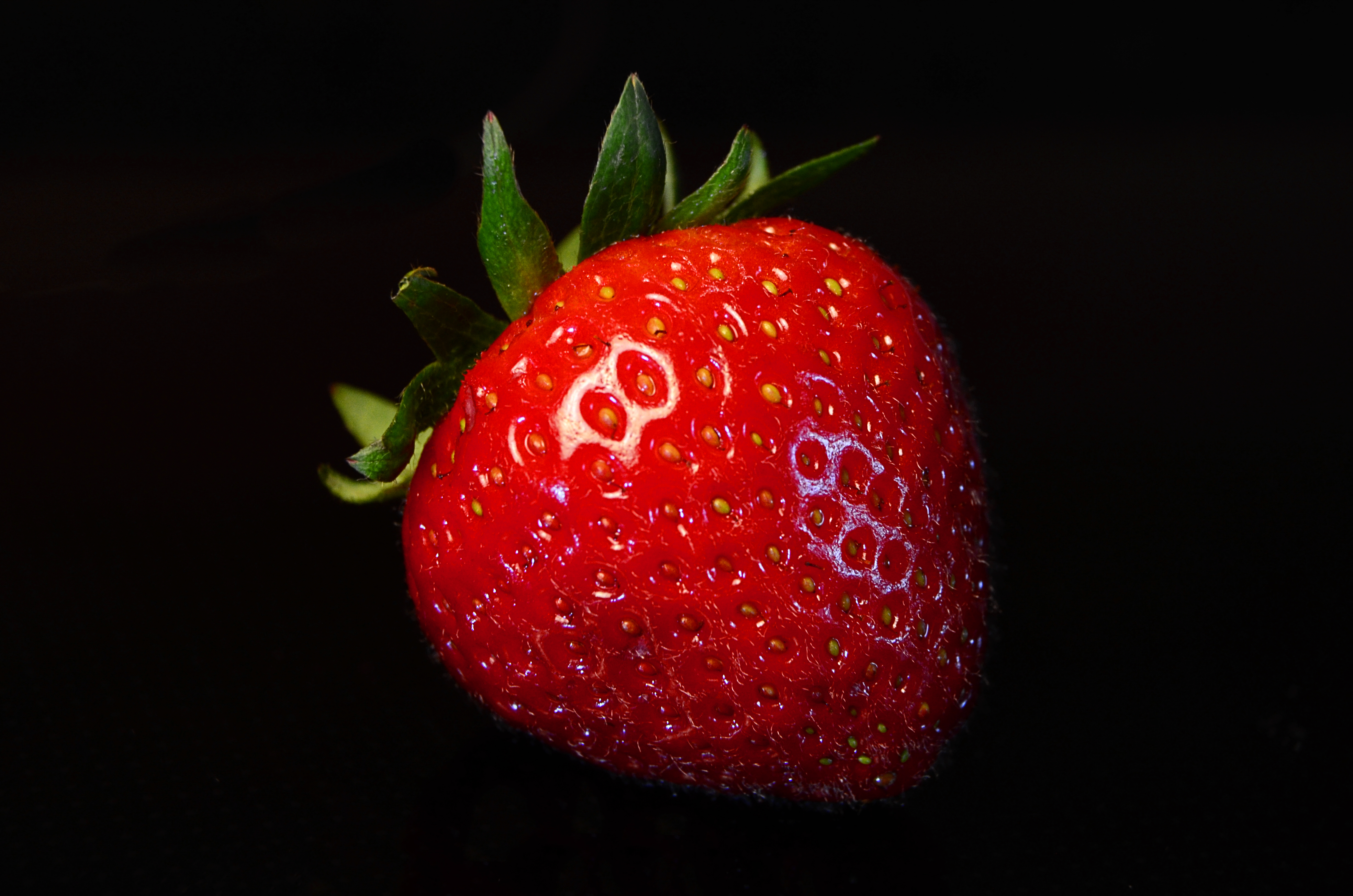 Erdbeere